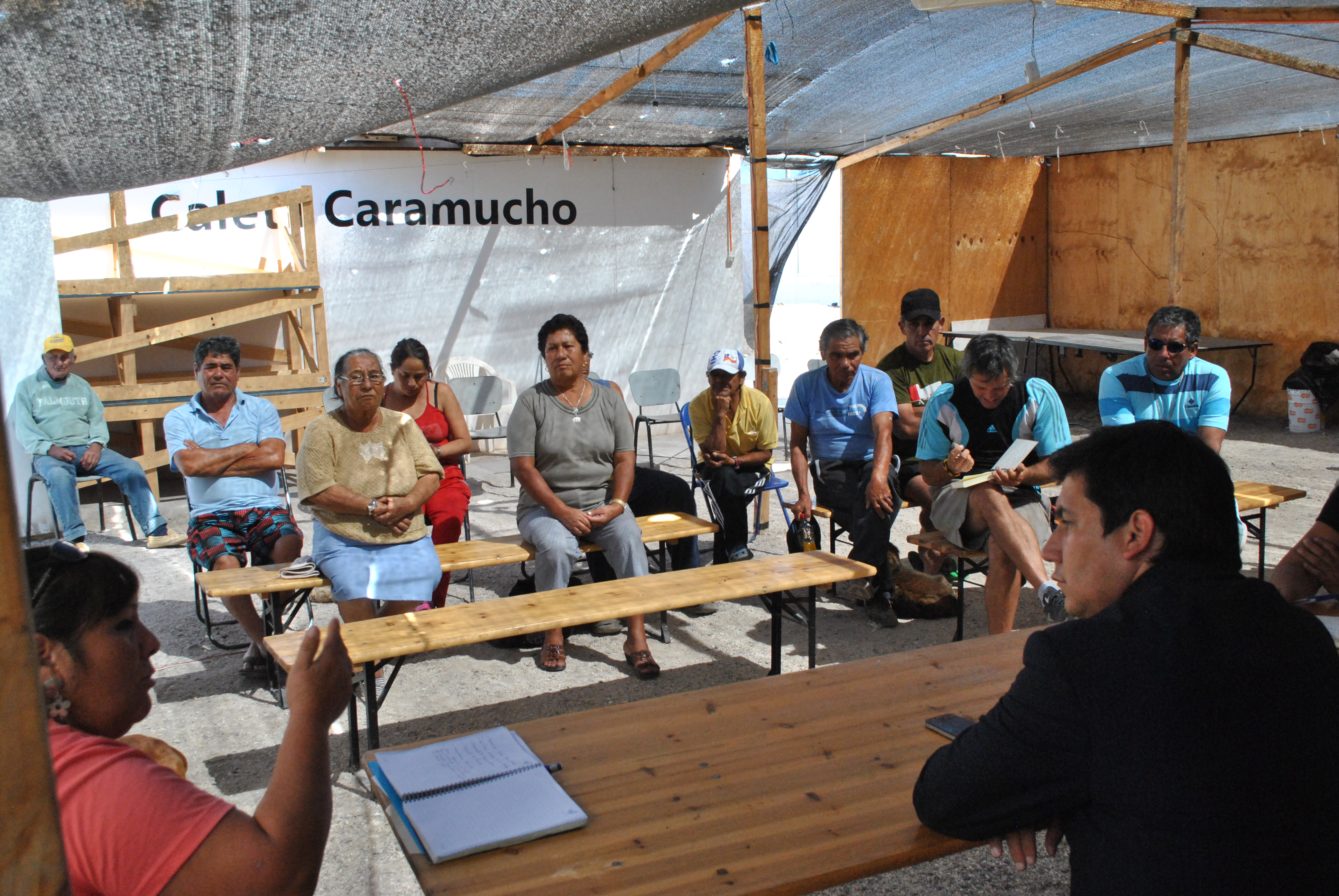 Entre ellos, el más urgente es el arreglo del camino de acceso a la isla de seguridad, dijo Susana Valdés López, quien el 7 de abril asume como presidenta de la Junta de Vecinos de Caramucho, en reemplazo de Ruth González. “Más que un camino, es solo una huella que está en mal estado. En su época, vino el entonces gobernador Felipe Rojas y prometió hacer un camino de verdad, pero solo fue una promesa, ya que no cumplió con su palabra”, recordó Jimmy Gómez, uno de los vecinos. La isla de seguridad se ubica a 2.100 metros de la caleta y en promedio se emplean 25 minutos en llegar a ella, “pero como tenemos muchos adultos mayores debemos evacuar en nuestros vehículos, pero corremos el riesgo de quedar enterrados en la arena, por ello necesitamos que se mejore este acceso”, dijo Susana Valdés. En tanto, Alberto Olivares, presidente del Sindicato de Pescadores, recordó que la caleta está en zona de inundación “y por ello se hace necesario arreglar el camino hacia la isla para así hacer más expedito el proceso de evacuación. Hoy, ese camino es un arenal que complica la evacuación”. GOBERNADOR En la reunión, Gonzalo Prieto informó que tras el sismo del domingo 16 de marzo recorrió todas las caletas, percatándose de que todas ellas comparten un problema común: los malos caminos de acceso hacia las islas de seguridad. “Este tema se ha conversado con el intendente y el seremi del MOP para ocuparnos de todas las caletas, entre ellas, por supuesto, Caramucho. Tenemos que mejorar los accesos y junto a ello dotar de más elementos a cada una de las isla de seguridad ubicadas en las caletas”.